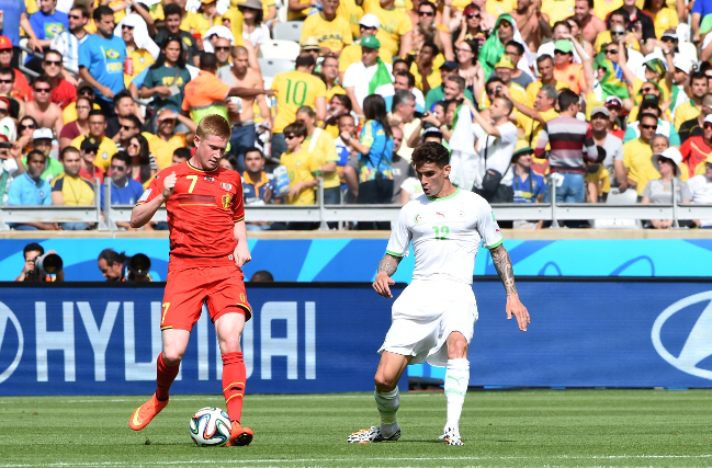 De Bruyne atuando na Copa do Mundo